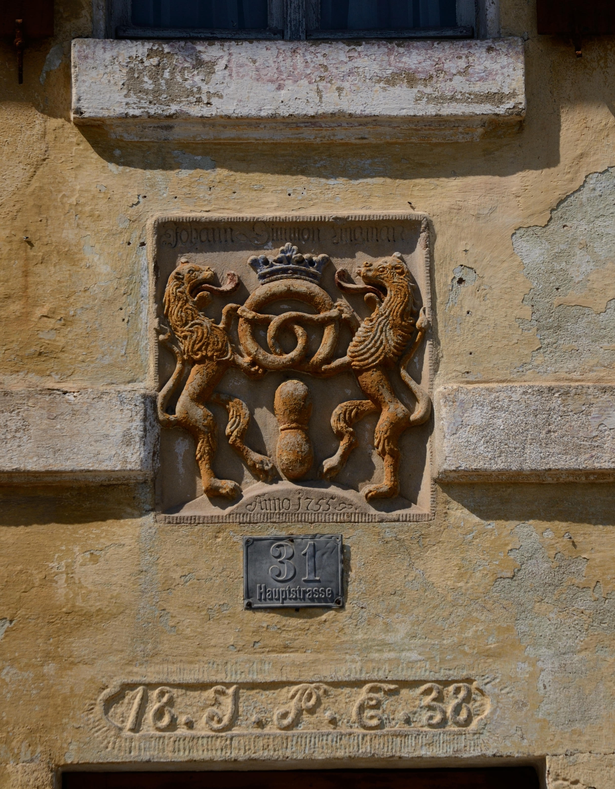 Alte Bäckerei (Hauptstraße 31, Neuendettelsau)